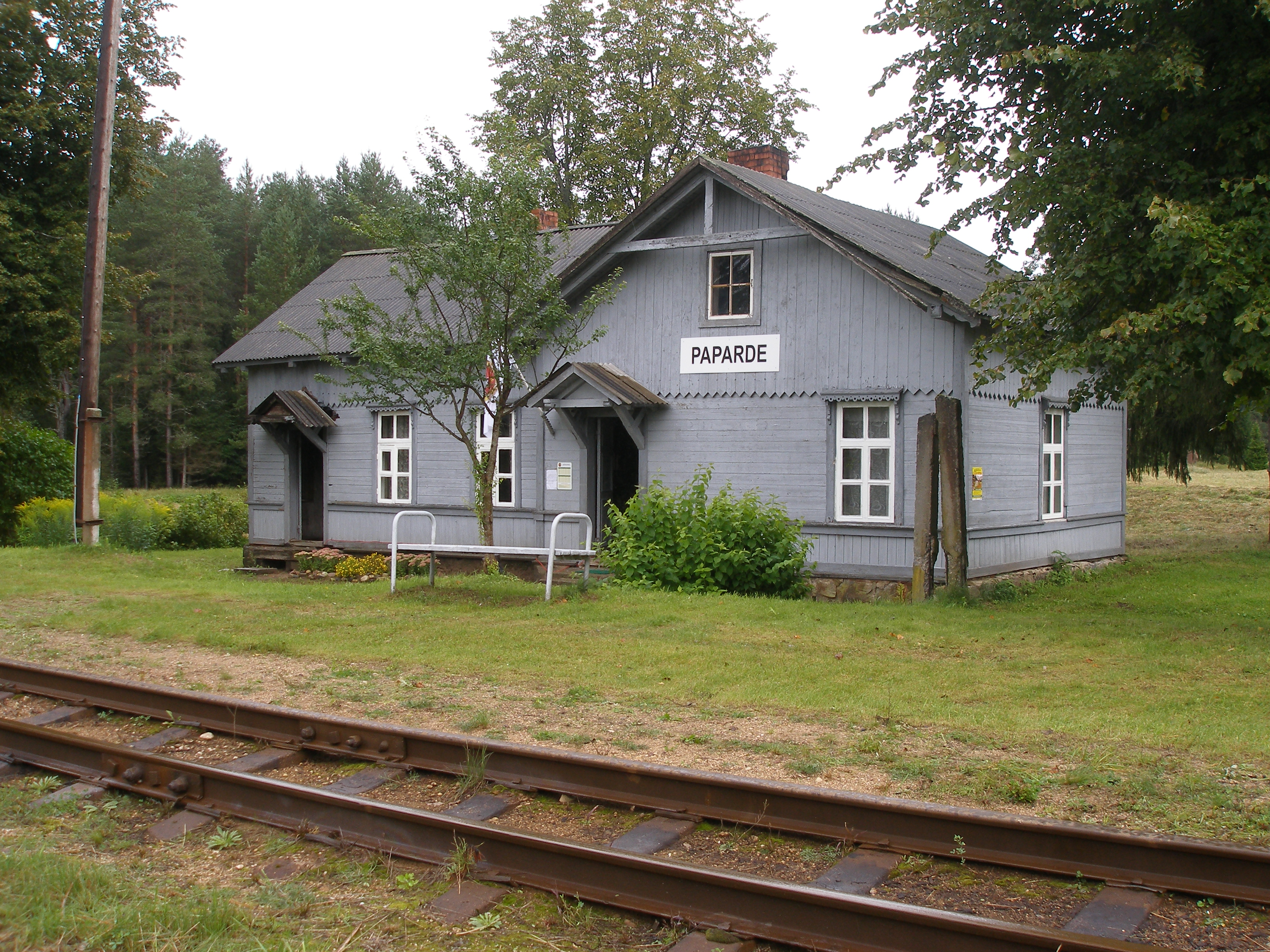 Papardes stacijas ēka un sliedes